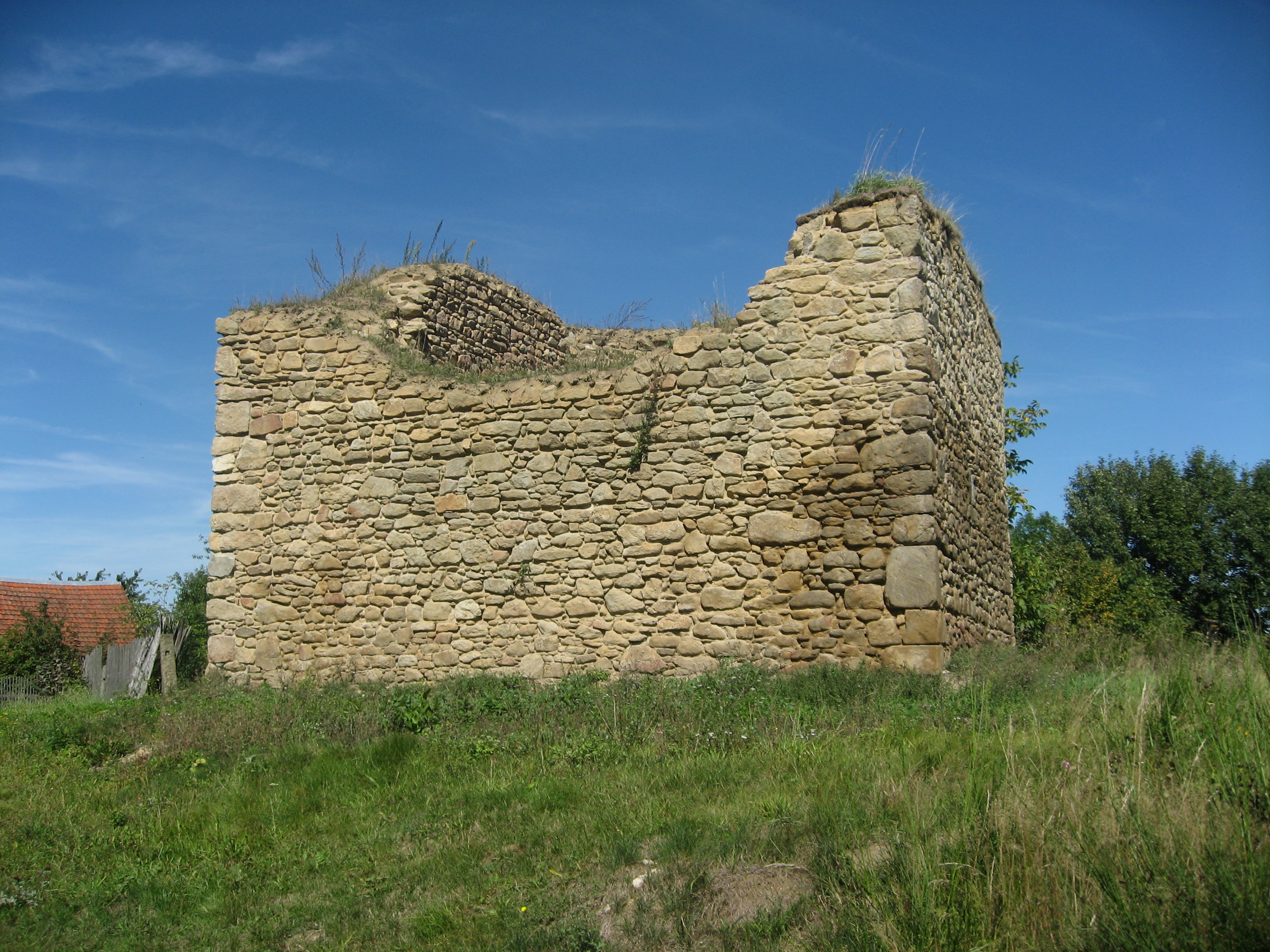 Proseč (u Humpolce), okres Pelhřimov - zbytky gotické tvrze